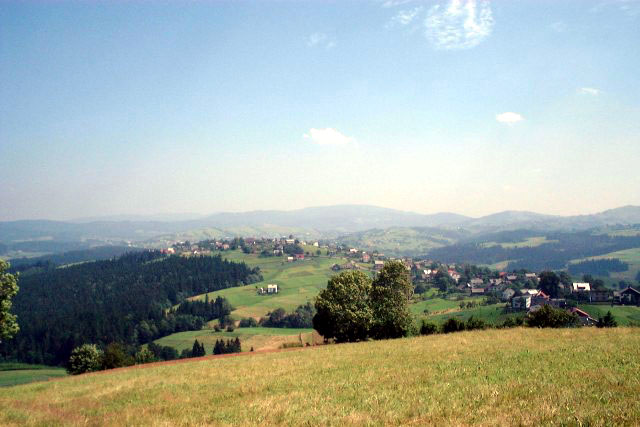 Poland, Jaworzynka - view in direction of Istebna and Koniaków.